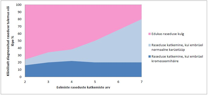 Normaalse karüotüübi esinemise tõenäosus aborteerunud loodetel suureneb iga järgneva raseduse katkemisega, samas kui kromosoomihäiretega loodete puhul jääb sagedus samaks.